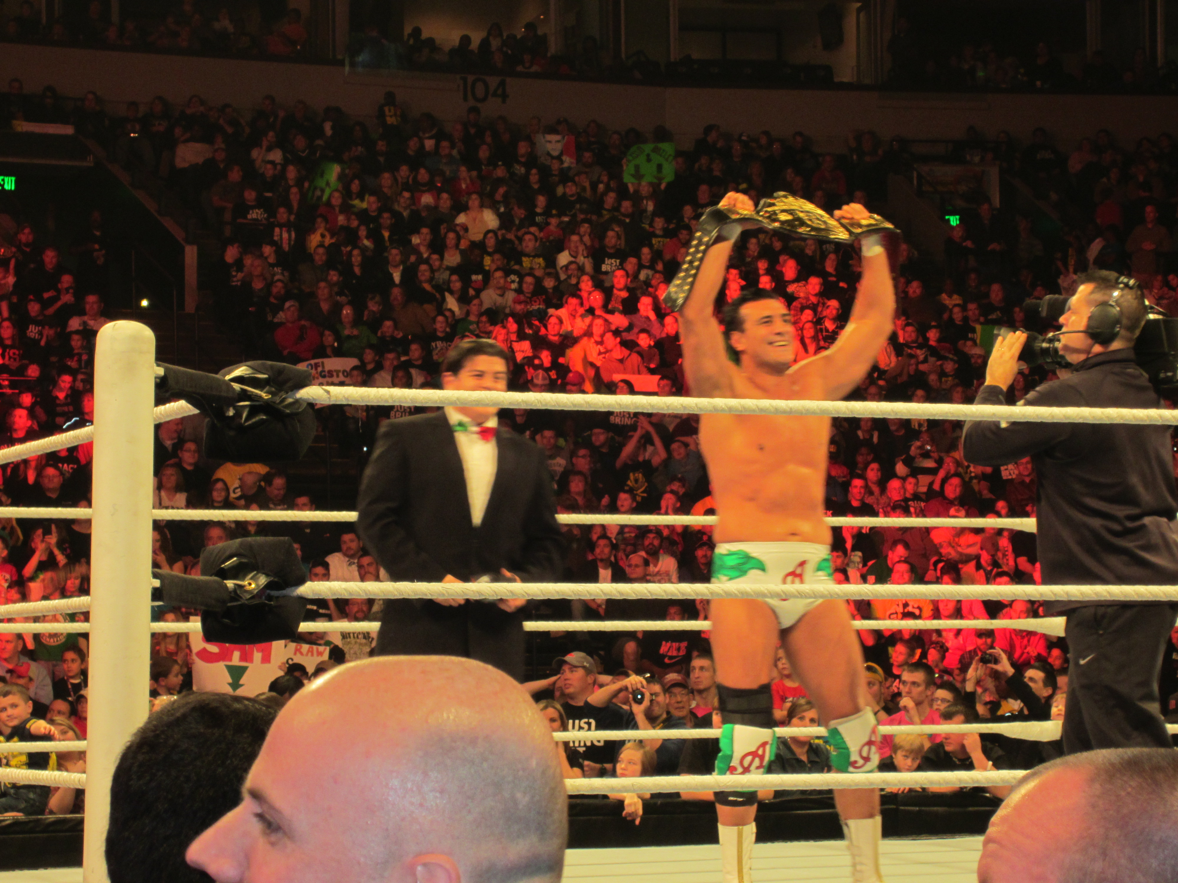 Alberto Del Rio posing